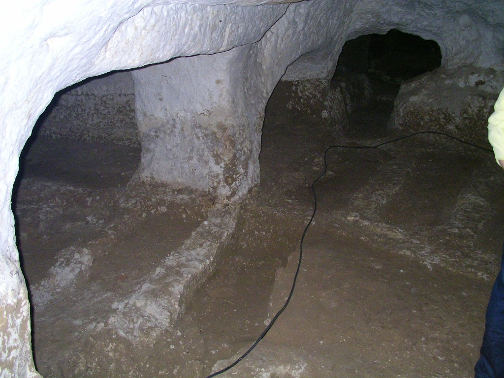 Katakombe von Villagrazia di Carini